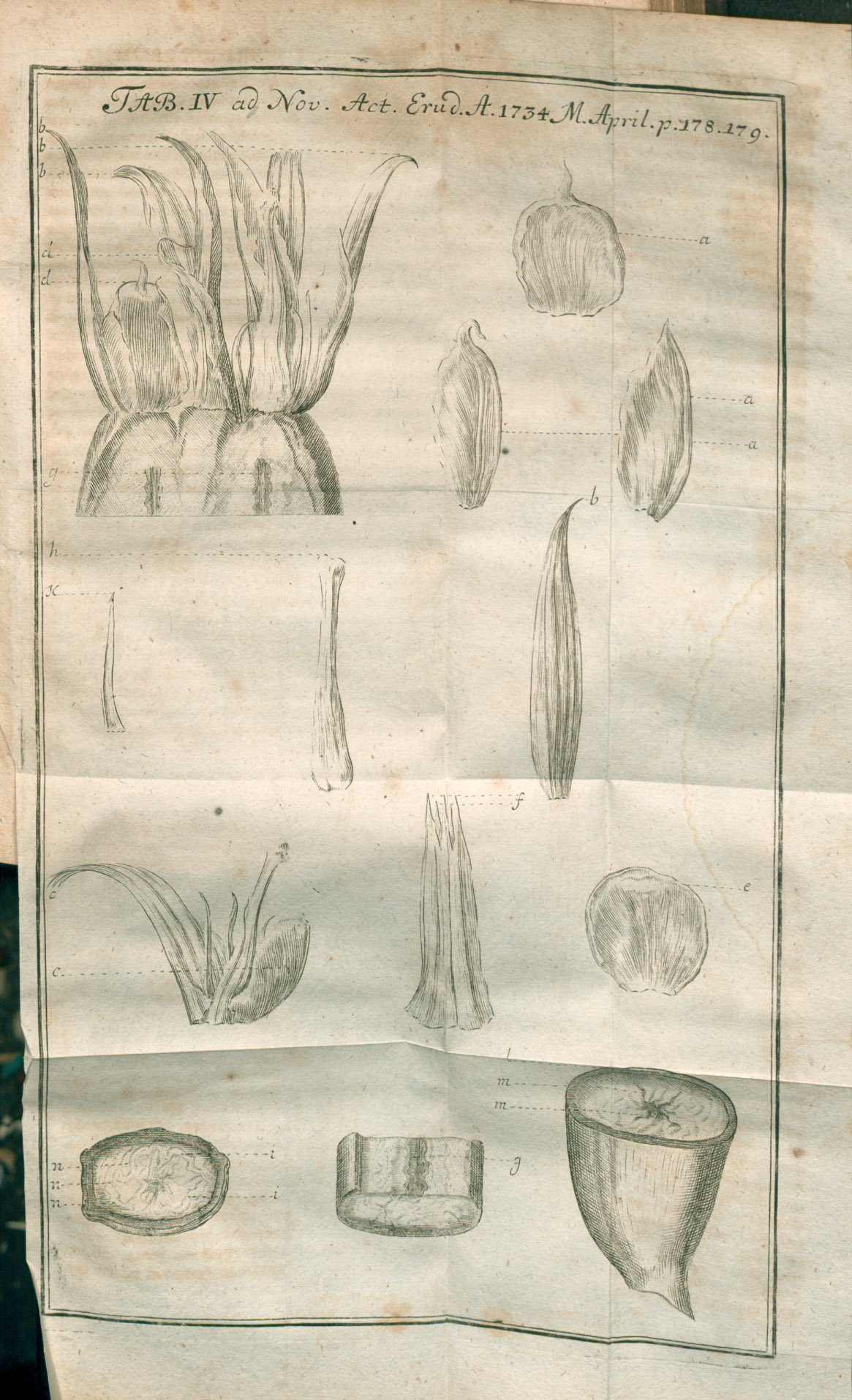 Illustration